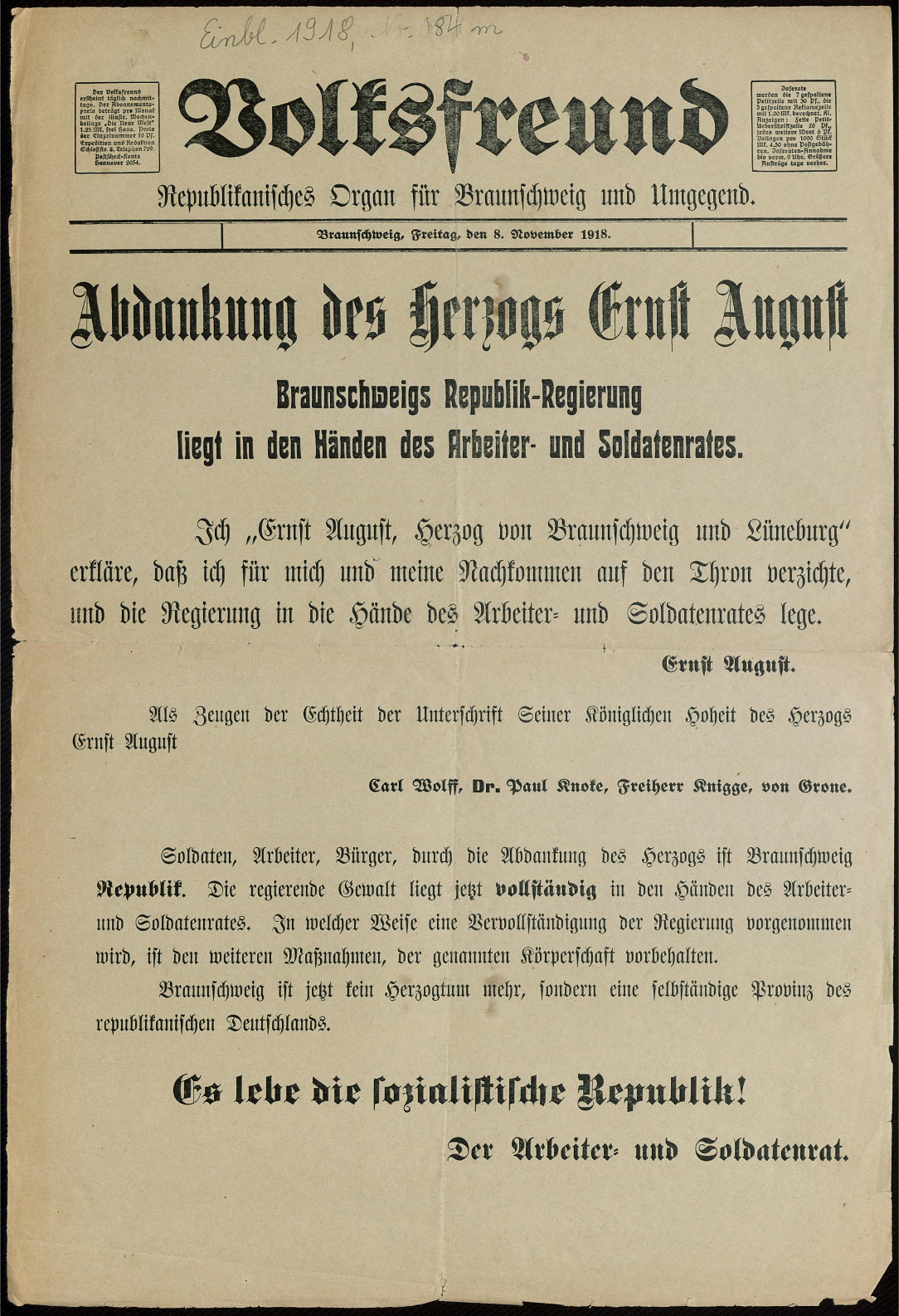 Braunschweig, Novemberrevolution in Braunschweig: Schlagzeile des Braunschweiger Volksfreunds zur Abdankung von Herzog Ernst August von Braunschweig-Lüneburg am 8. November 1918.